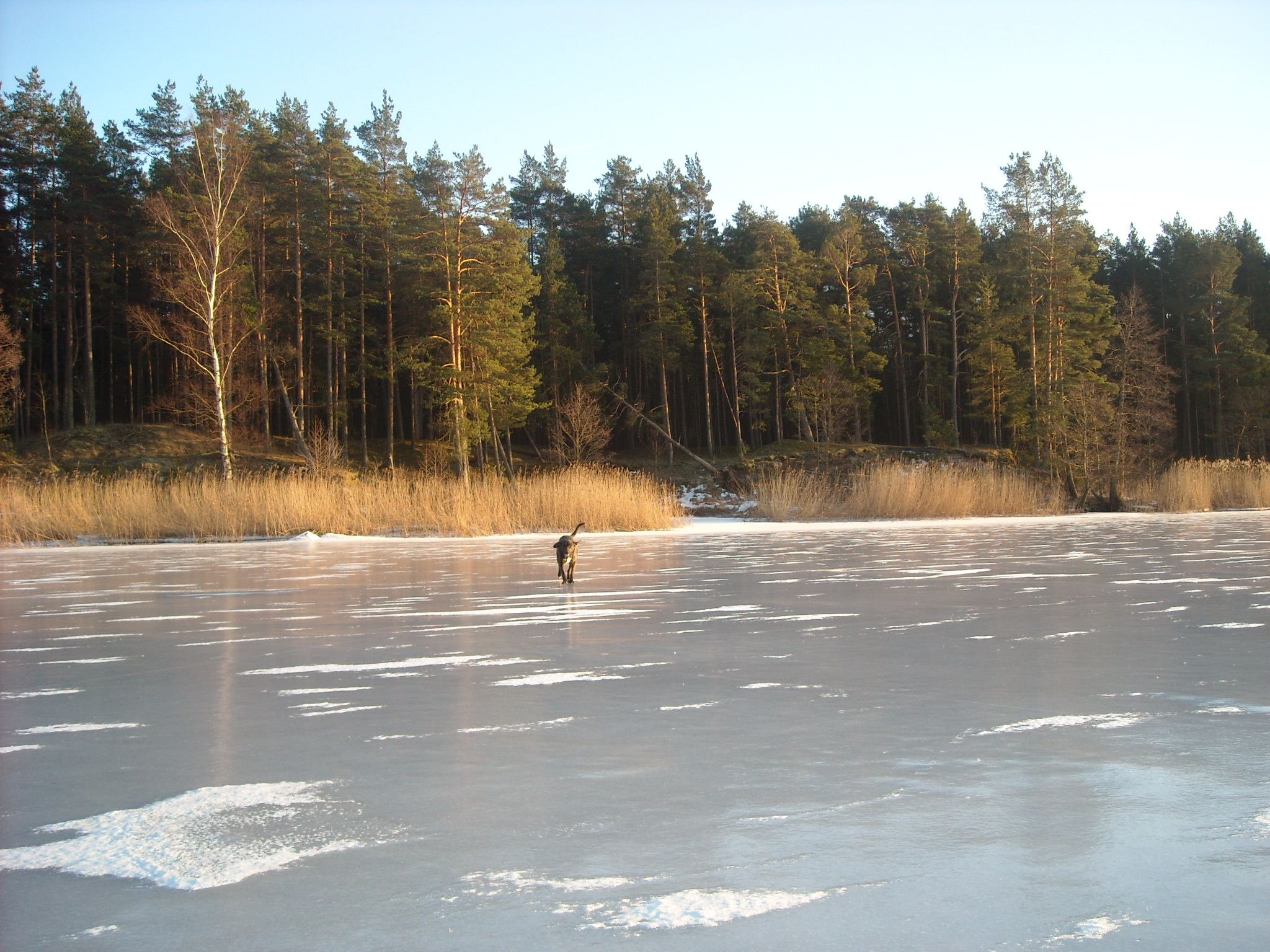 lielupe